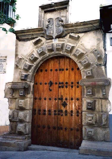 Casa de Gregorio López, Guadalupe, Cáceres